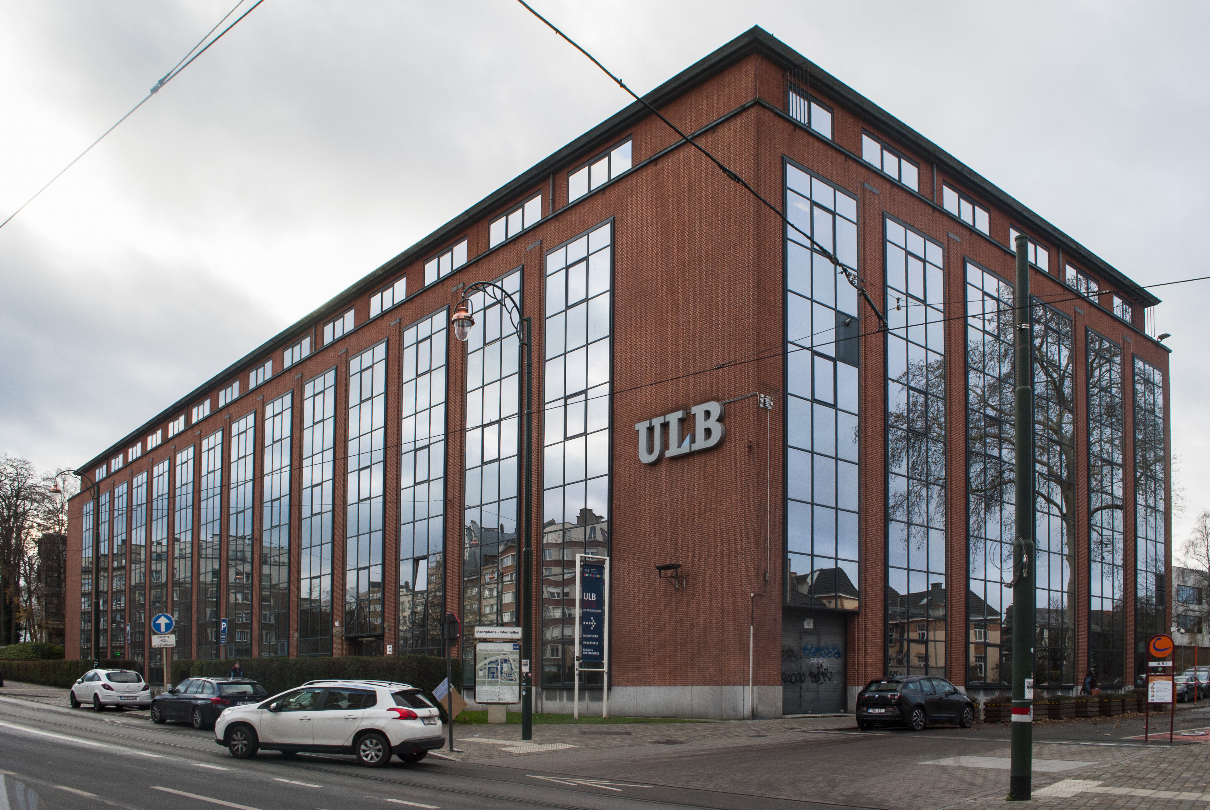 Bâtiment C du campus Solbosh de L'ULB